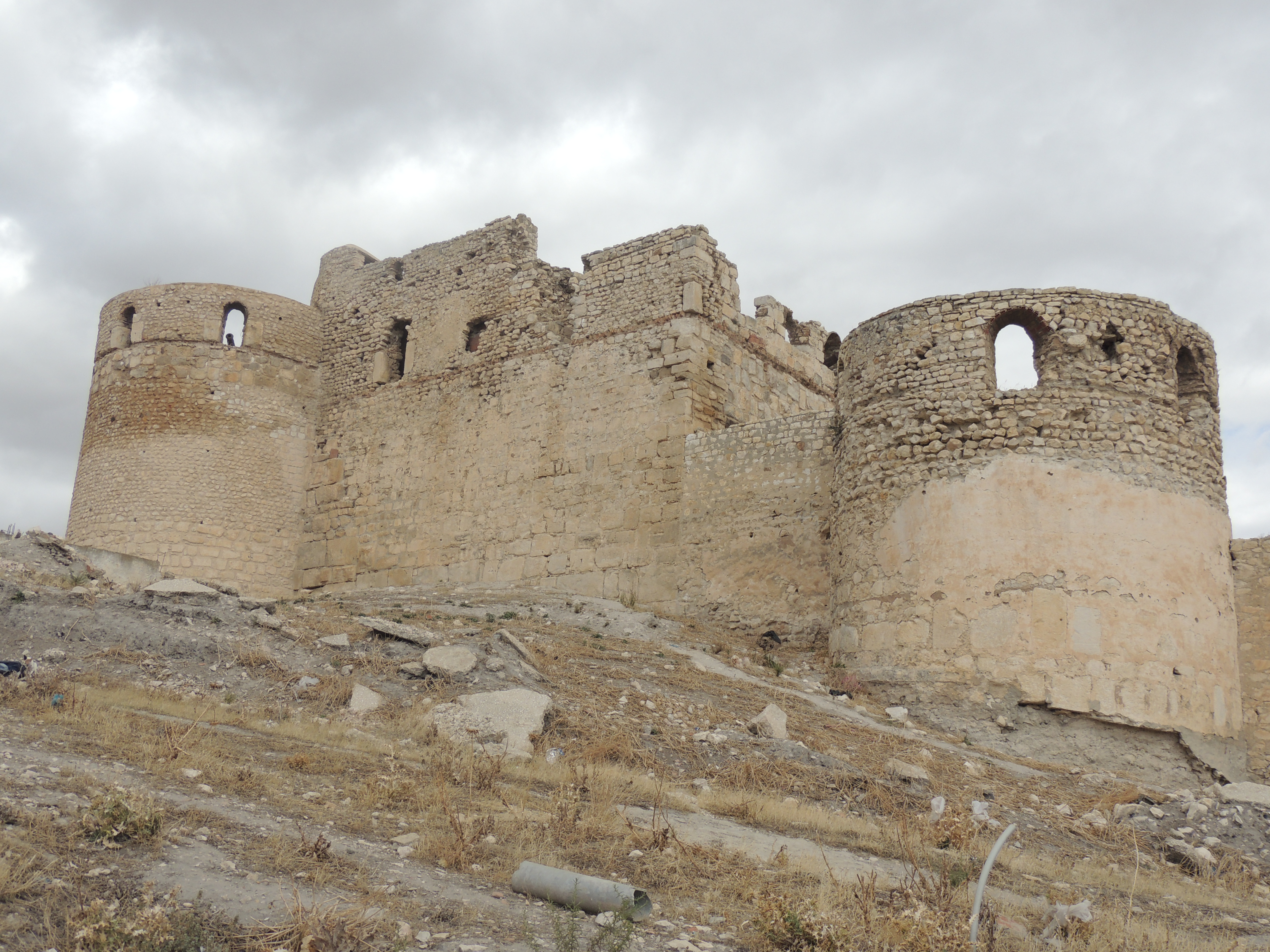 Murailles et tours de l'enceinte byzantine, construite sous Justinien par le Comte Paulus et refaite postérieurement